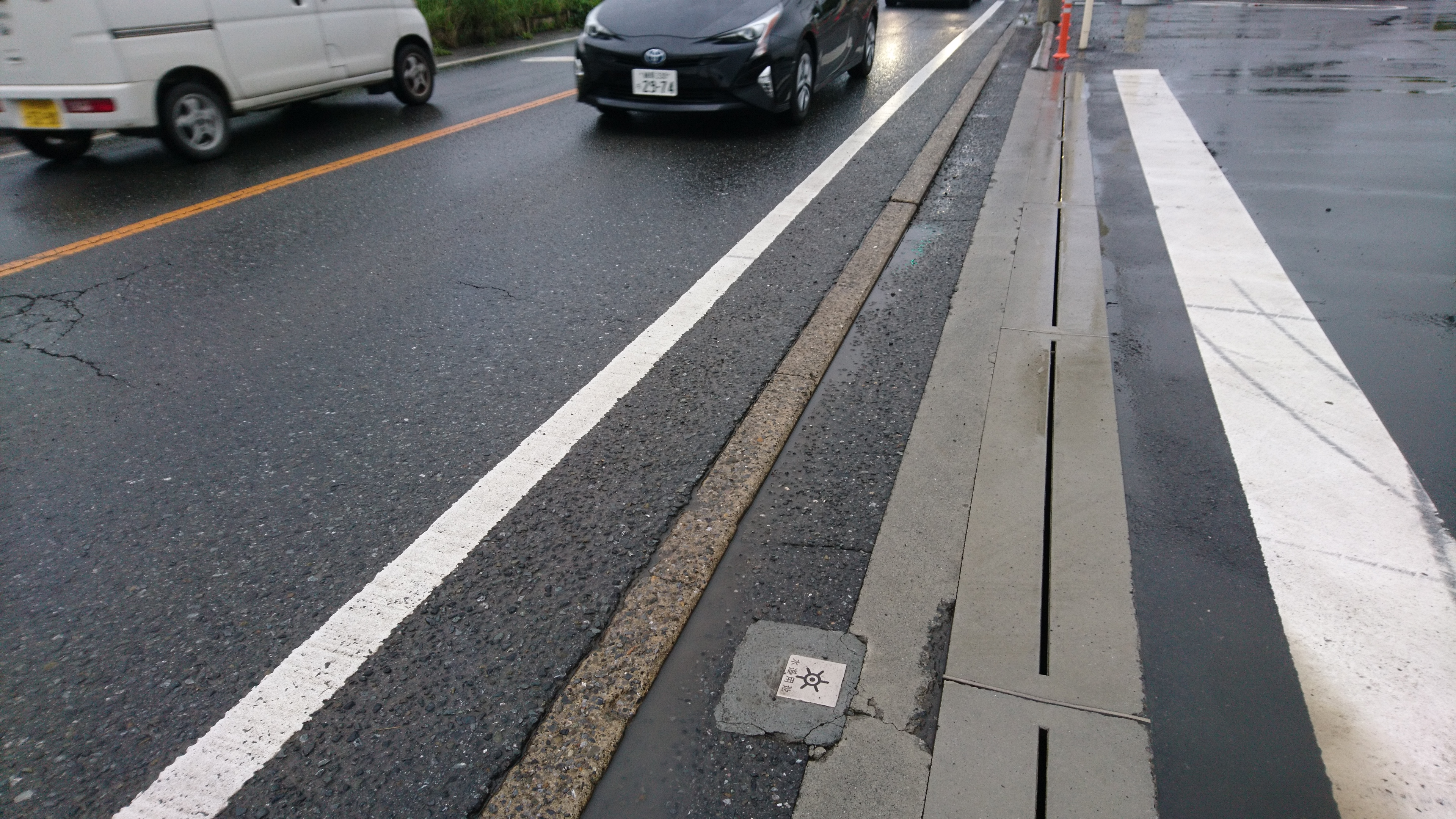 埼玉県道８８号和光インター線における東京都水道局の境界杭 令和元年７月撮影